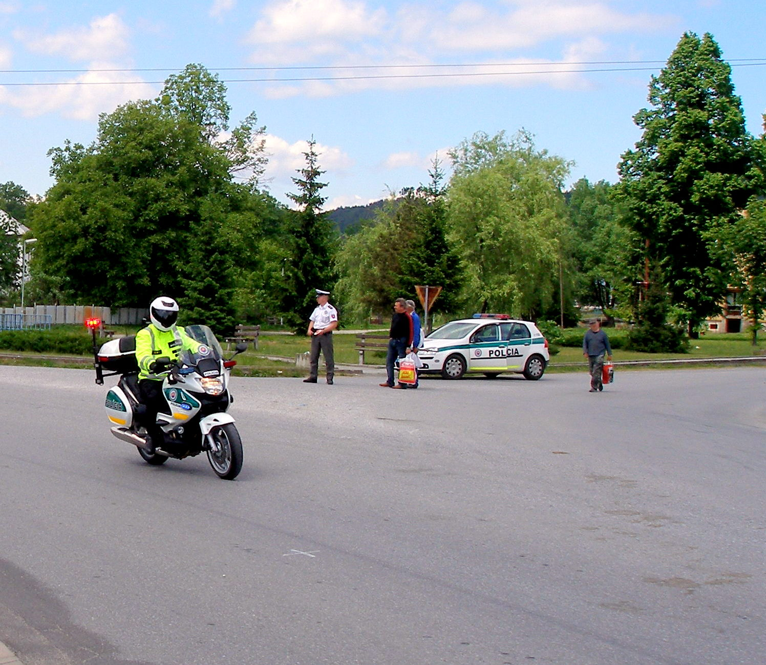 Obec Sedlice okres Prešov región Šariš. Cyklistické preteky Košice-Tatry-Košice, časť 4.etapy viedla aj cez Sedlice. 23.máj2009.